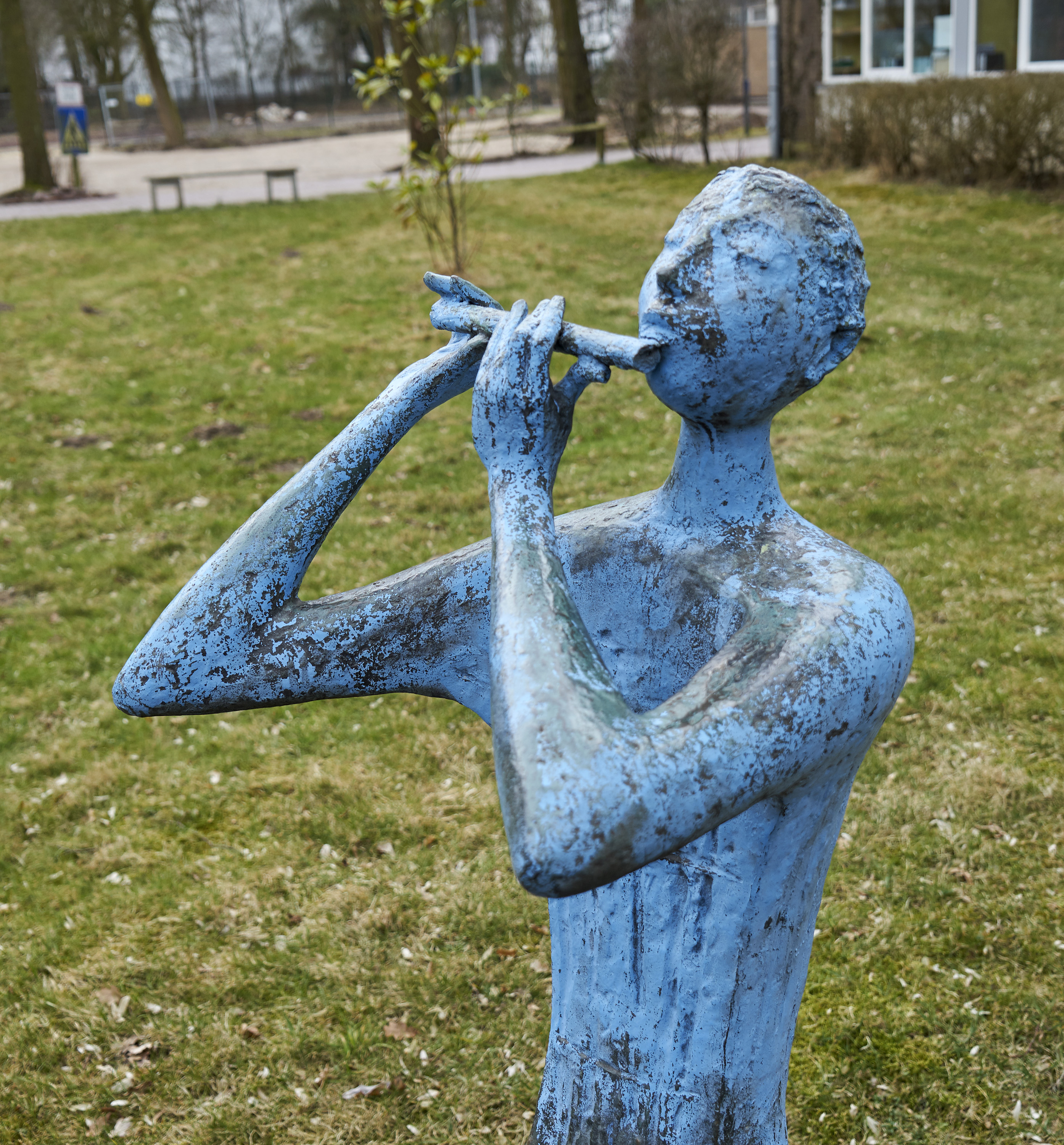 Walter Wadephul „Der Flötenspieler“ 1963, Bremen